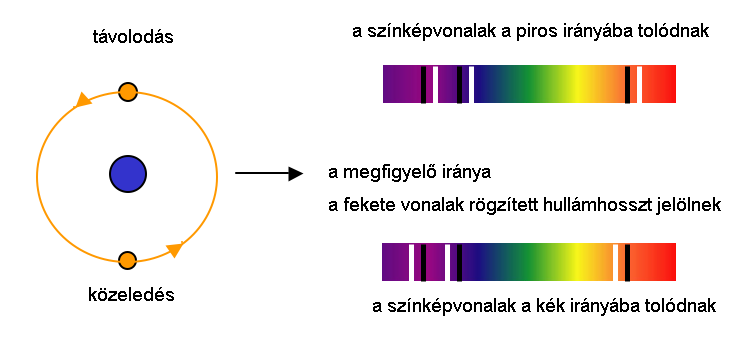 Kettőscsillag színképeltolódása